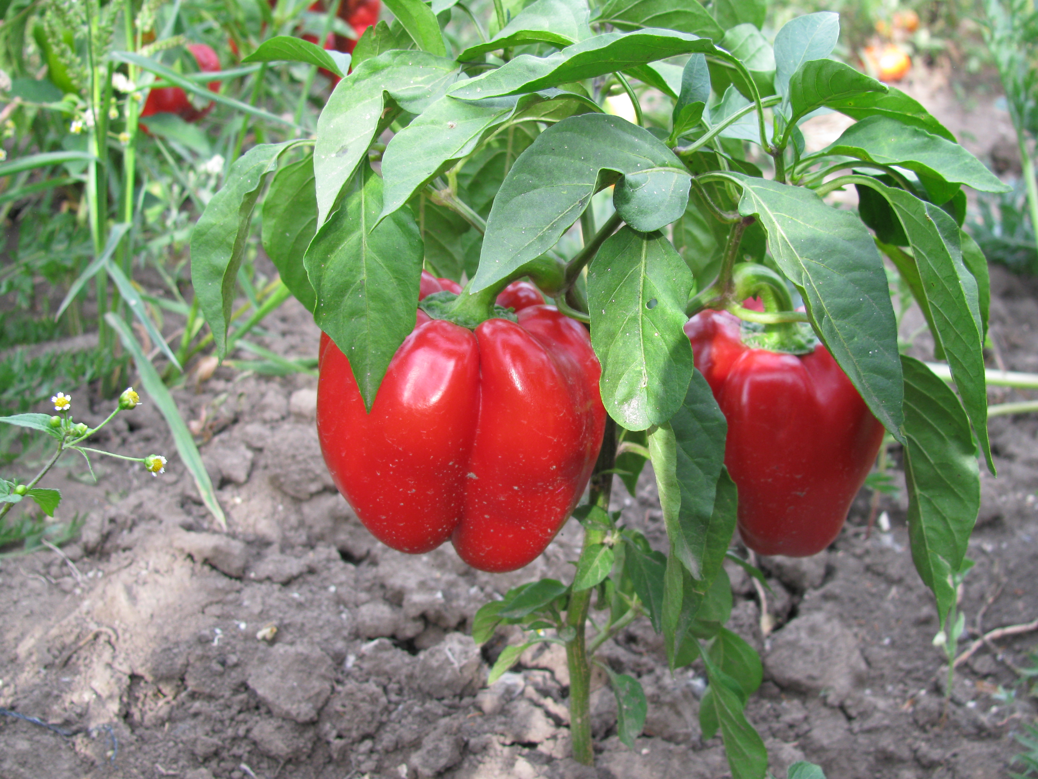 Гогошар